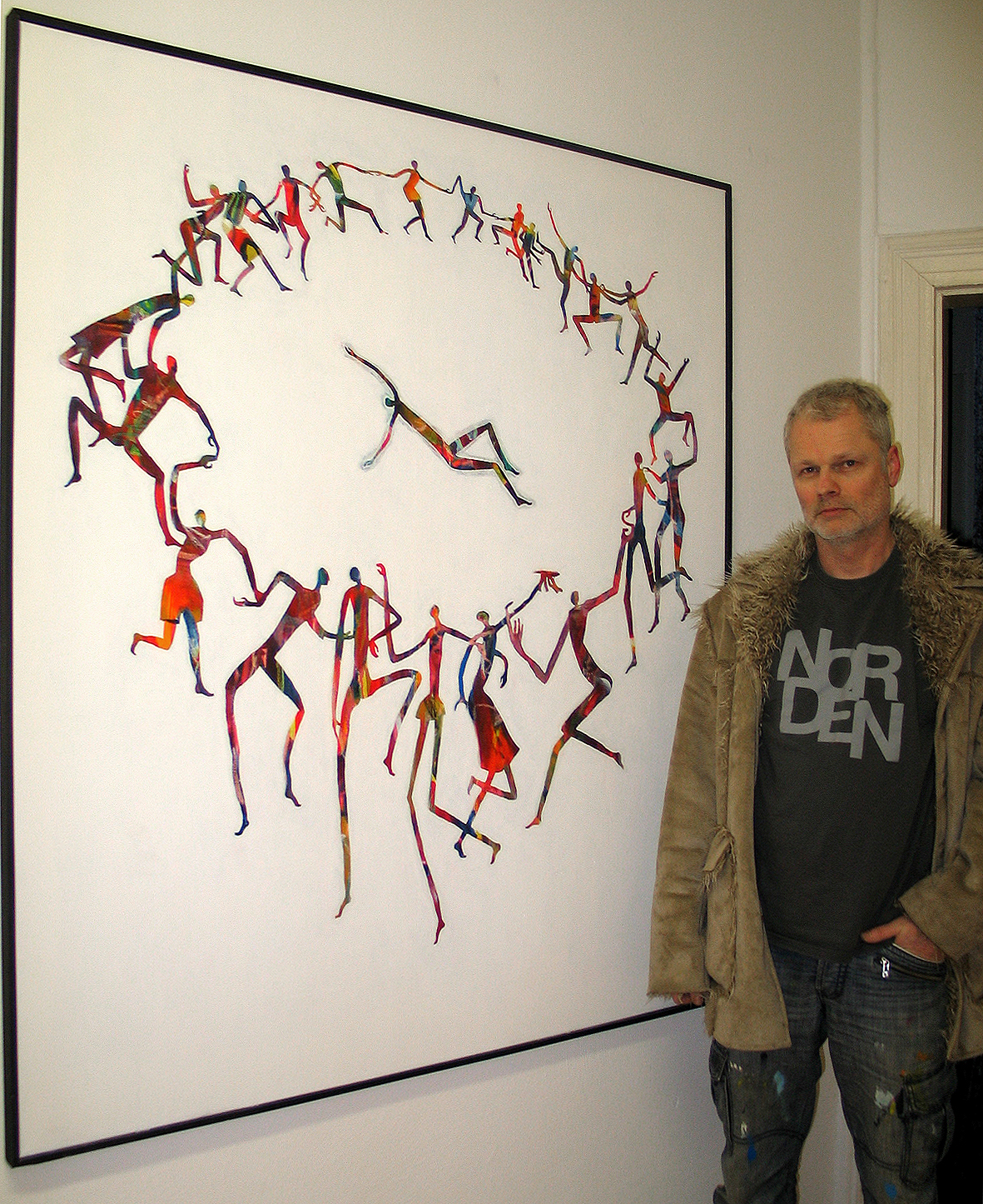 Der Künstler Ralf-Peter Post posiert für uns alle über Commons hinter seinem Werk Le Sacre du Printemps, hier während der Ausstellung Figurative Gespräche (bis 8. Februar 2013) in der Galerie bei Koc, Hahnenstraße 8, 30167 Hannover-Nordstadt ...